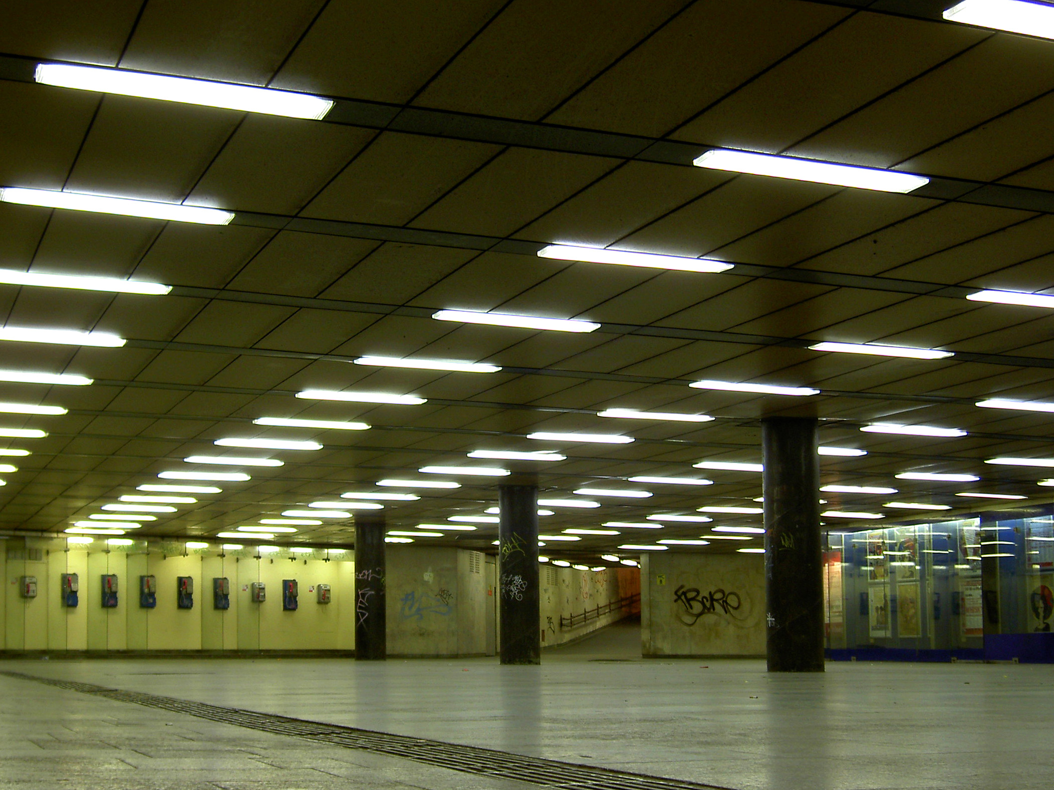 Podchod poblíž stanice metra Lehel tér, Budapešť Lehel tér